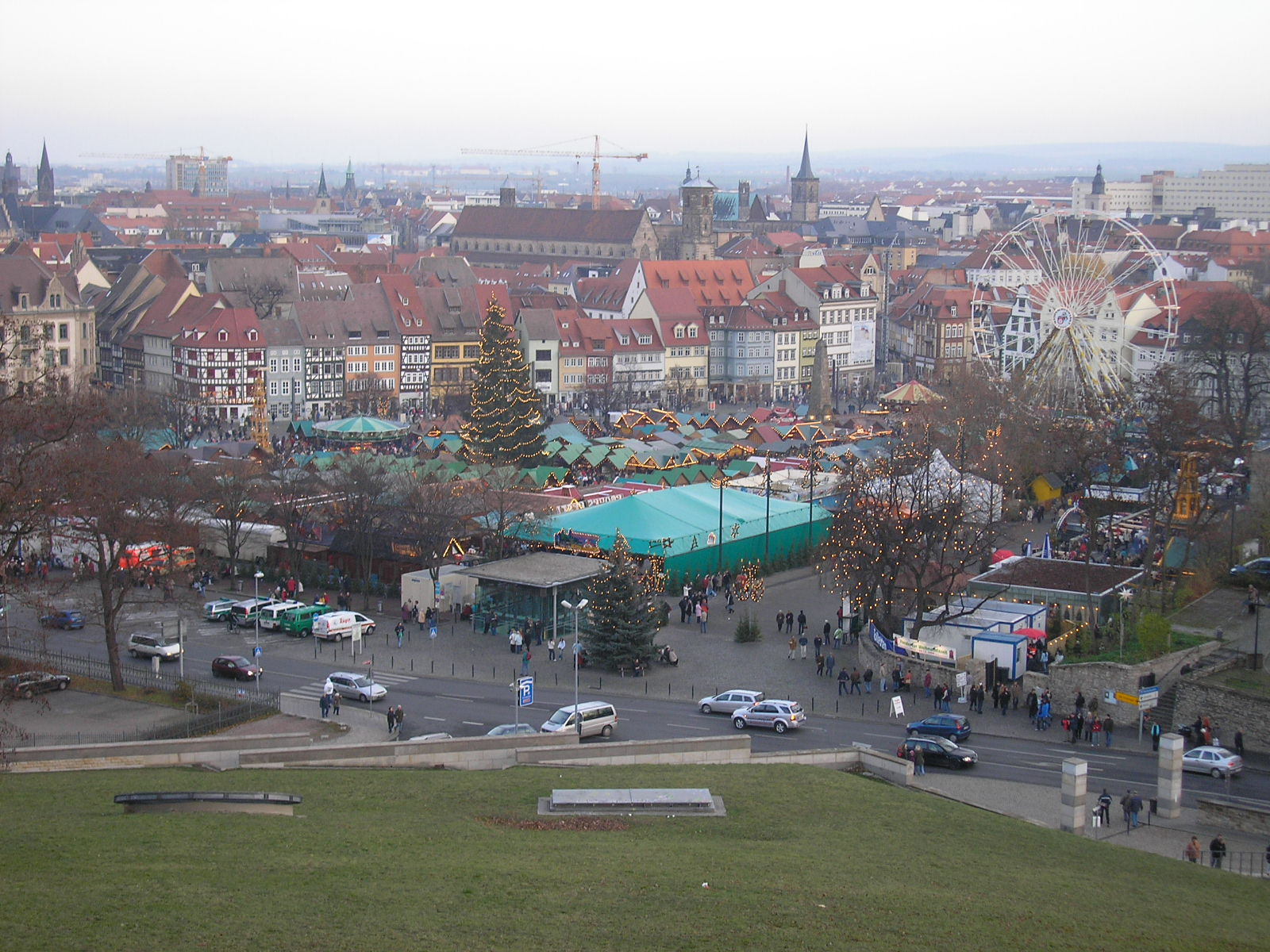 Weihnachtsmarkt auf dem Domplatz in Erfurt (Foto von der Zitadelle Petersberg aus).